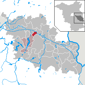 Langewahl in Brandenburg (Country) - District Oder-Spree